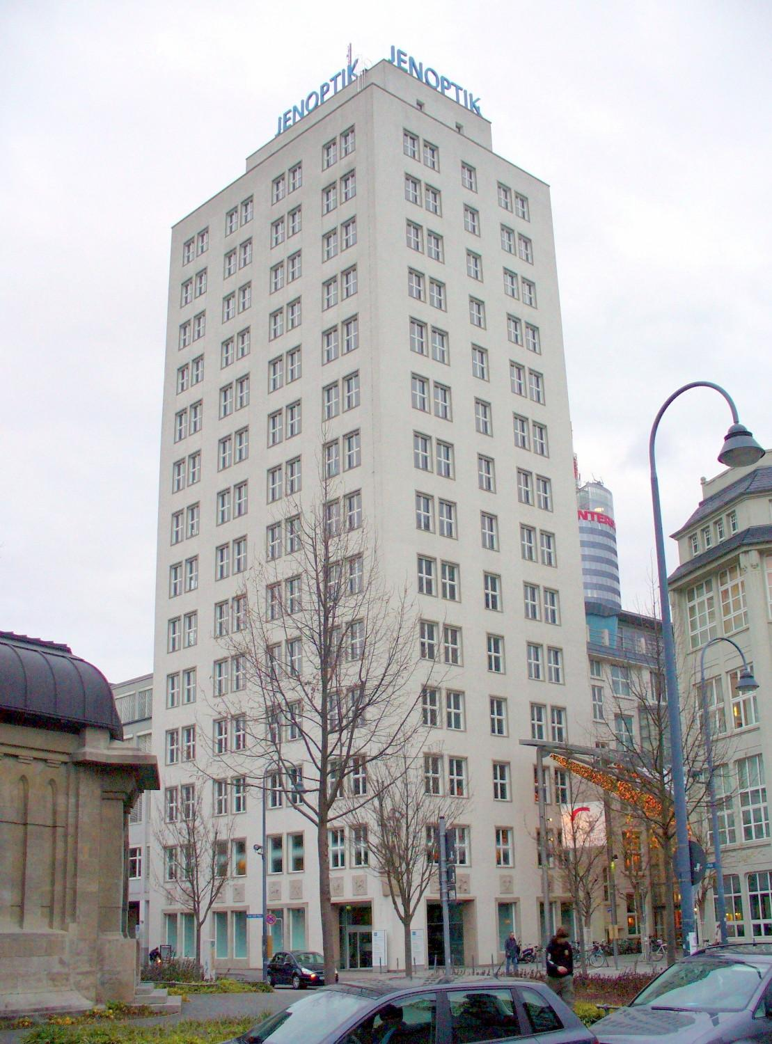 Bau 36